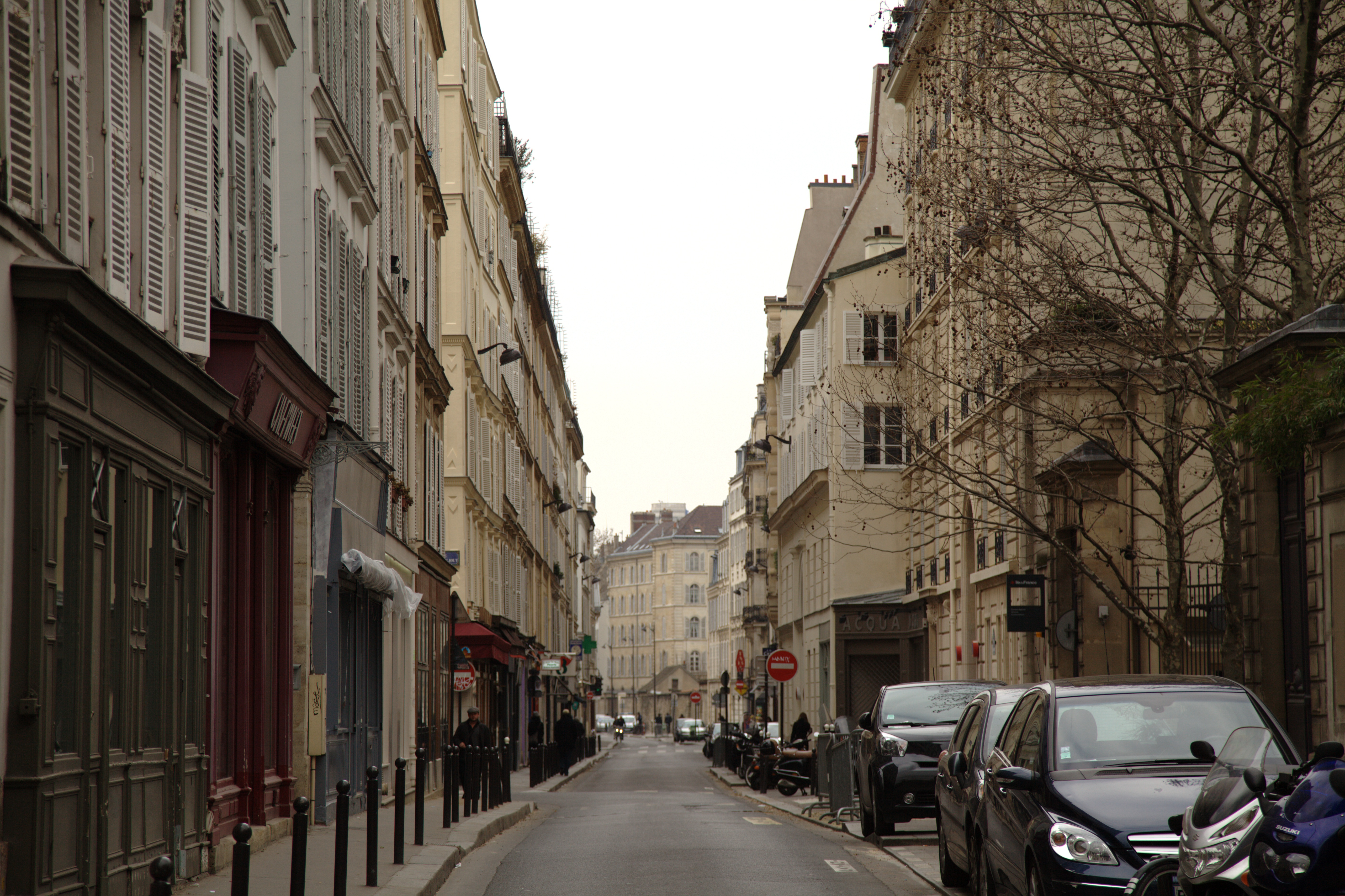 La rue de Babylone à Paris, vue depuis la rue Monsieur vers l'est